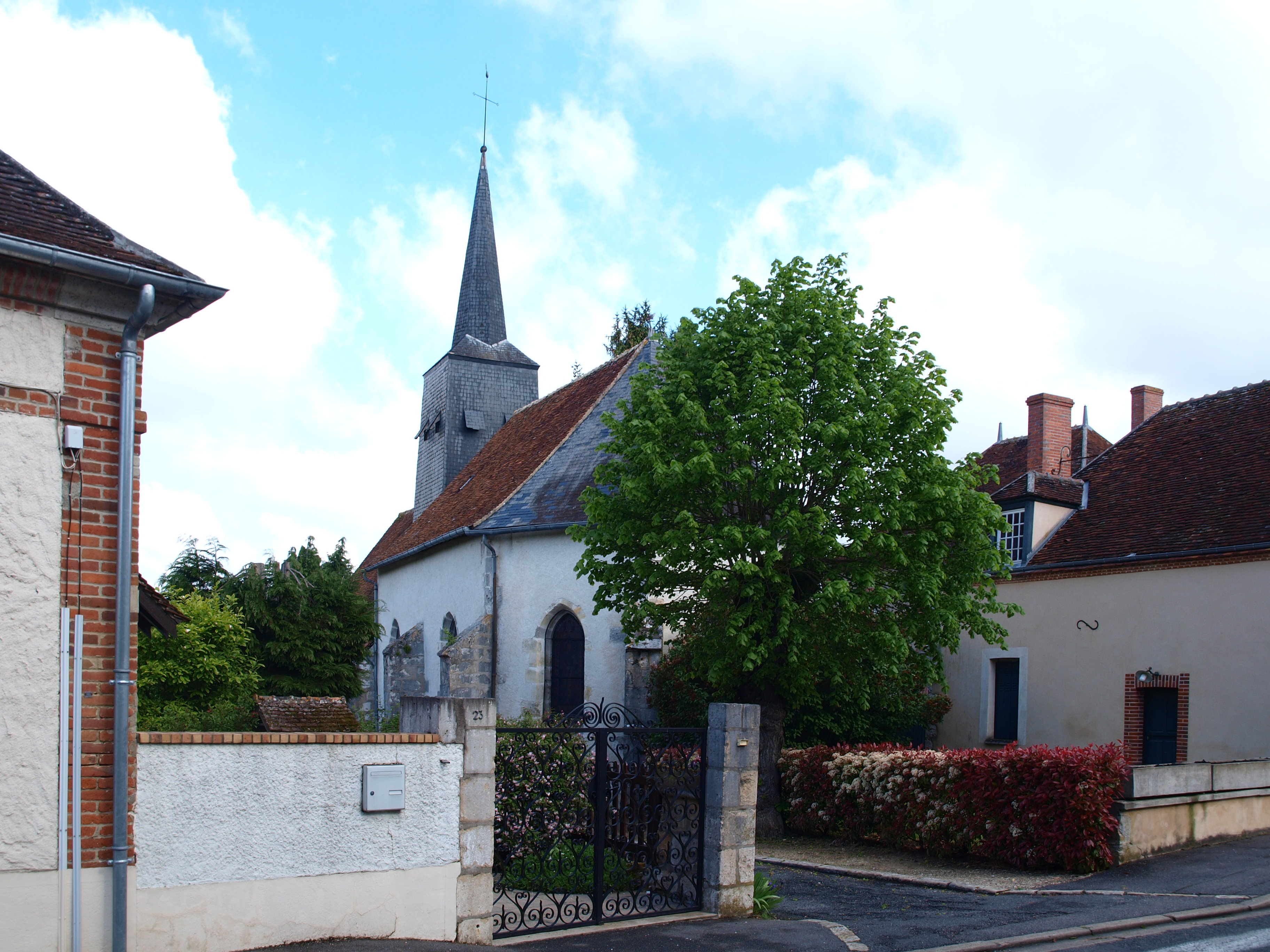 Boismorand (Loiret, France)